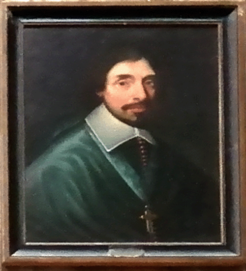 Poltred en iliz-veur Landreger